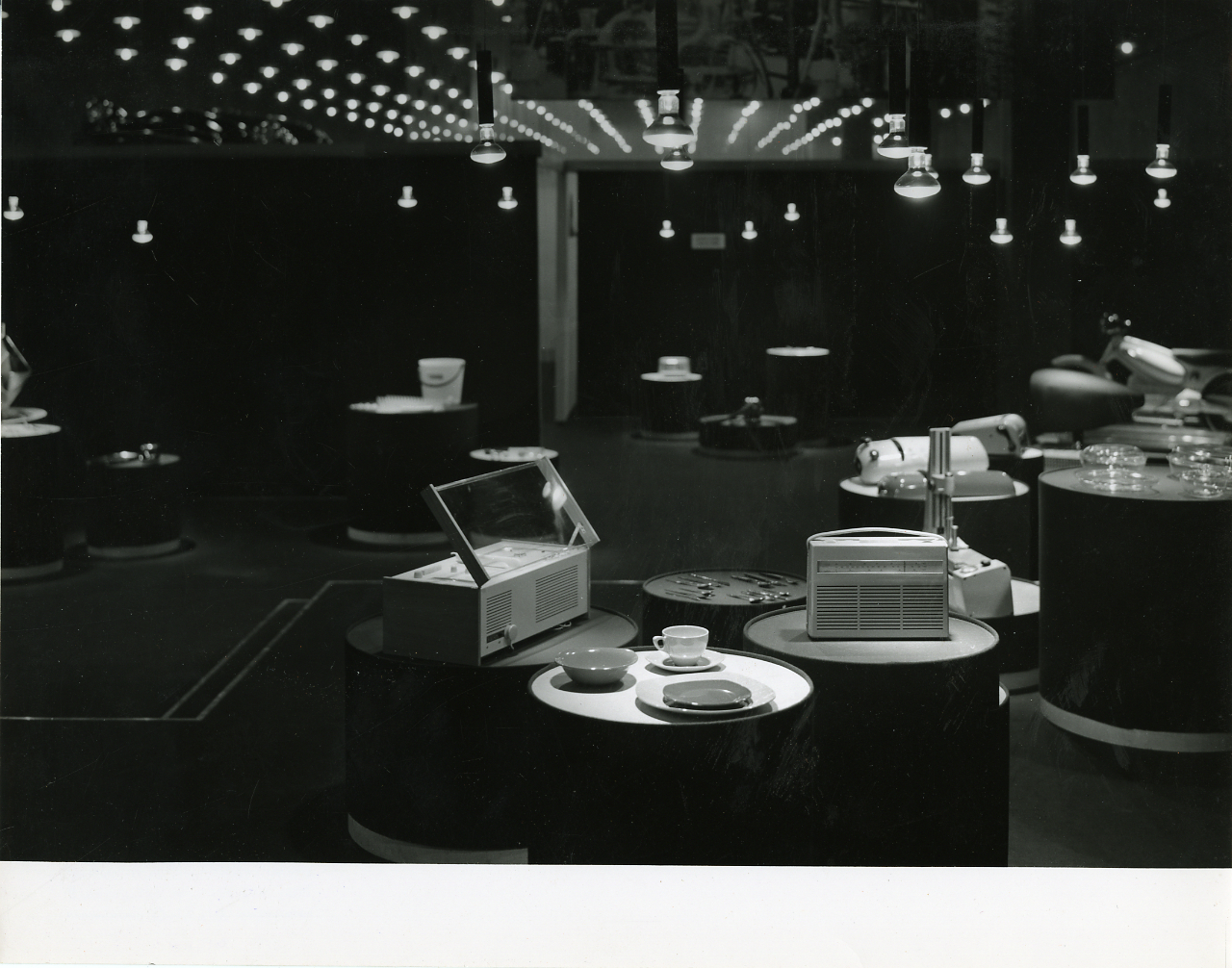 Milano. Palazzo dell'Arte. X Triennale di Milano. A e P.G. Castiglioni, R. Menghi, M. Nizzoli e A. Rosselli, Mostra dell'IndustrialDesign. Allestimento. Servizio fotografico : Milano, 1954 / Paolo Monti. - Stampe: 2 : Positivo b/n, gelatina bromuro d'argento/ carta, 24x30. - ((Al verso delle stampe manoscritti i numeri dei negativi corrispondenti secondo altra numerazione: 2080 (lo stesso numero identifica 2 stampe - 2 copie); iscrizione didascalica manoscritta a matita: "Ind design"; timbro a inchiostro con copyright (Foto "Fotogramma" s.r.l. - Via Colonna - Milano). - Sul coperchio della scatola iscrizione didascalica manoscritta a pennarello nero: "Composizioni - studi - soffitte". - La X Triennale (Prefabbricazione - Industrial Design: Esposizione Internazionale delle Arti Decorative e Industriali Moderne e dell'Architettura Moderna) si tenne dal 28 agosto al 15 novembre del 1954. - Occasione: Documentazione della X Triennale di Milano, 1954. - Fonte: Monografia di Pica, Agnoldomenico: Storia della Triennale di Milano, 1918-1957, Milano, Edizioni del Milione (1957)